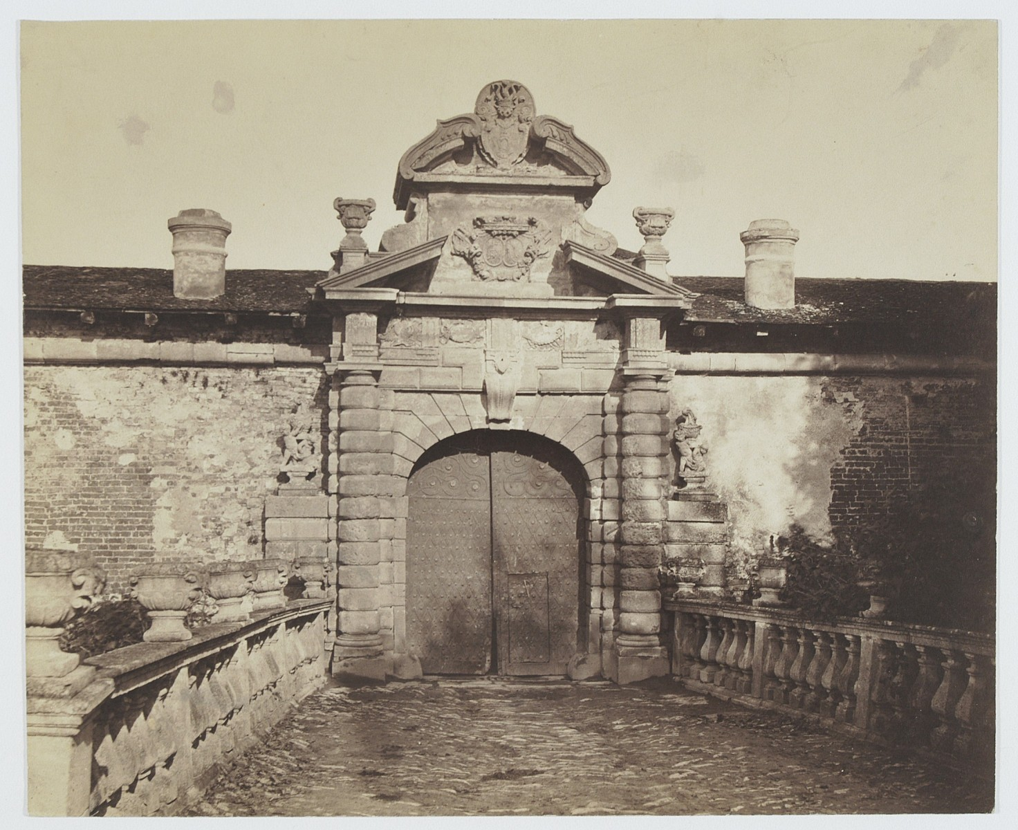 Підгірці: Брама Підгорецького замку